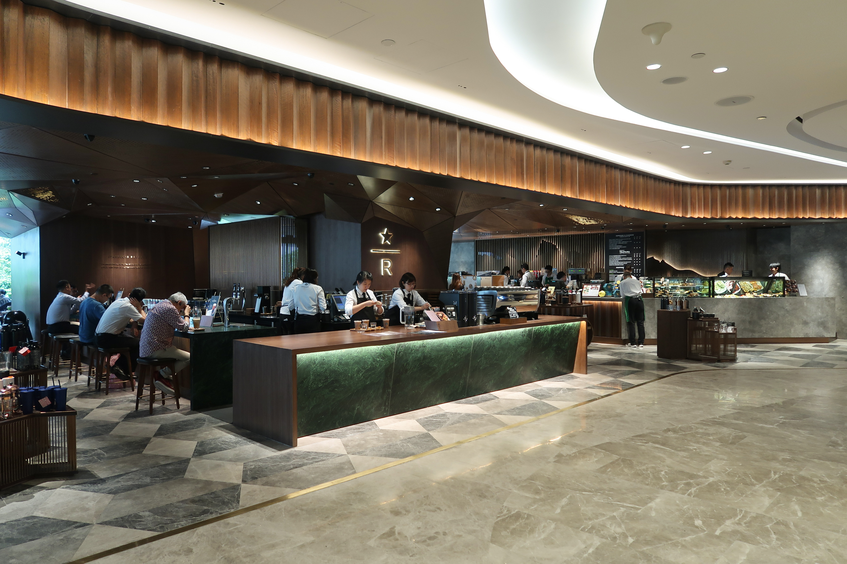 Lee Garden 3 Starbucks